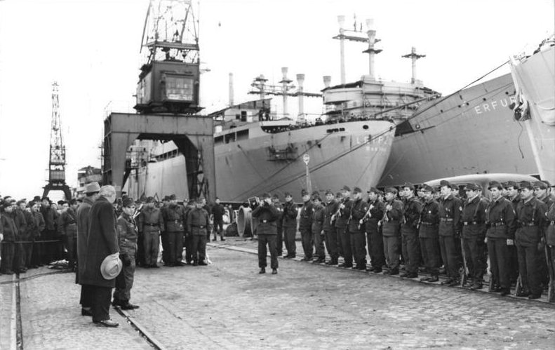 Zentralbild-Mellahn Me-Ho. 6.1.1959 Rostock - 10 000 Tonnen-Frachter "Steckenpferd" seiner Bestimmung übergeben. Das 3. Schiff der "Steckenpferd-Flotte", der 10 000 Tonnen-Frachter "Steckenpferd", wurde am 5.1.1959, in Warnemünde in Anwesenheit des Stellvertreters des Vorsitzenden des Ministerrats und Minister für Aussenhandel und Innerdeutschen Handel, Heinrich Rau, seiner Bestimmung übergeben. Durch die Steckenpferdbewegung, der ersten Massenbewegung der Werktätigen in den Exportbetrieben, konnten dem Aussenhandel insgesamt für 200 Millionen DM zusätzliche Waren zur Verfügung gestellt werden. Außer fünf Frachtschiffen wurden mit diesen Mitteln über den Plan bisher u.a. 4740 Personenkraftwagen, 6800 Motorräder, über 75 000 Rundfunkgeräte, 5000 Fernsehgeräte, 750 000 Paar Lederschuhe, 1200 Tonnen Kakaobohnen, 2250 Tonnen Kakaopulver, 2800 Tonnen Kaffee und 12 700 Tonnen Südfrüchte angekauft. UBz: Einheiten der Kampfgruppe der Warnow-Werft begrüssen Heinrich Rau (links, ohne Hut)."